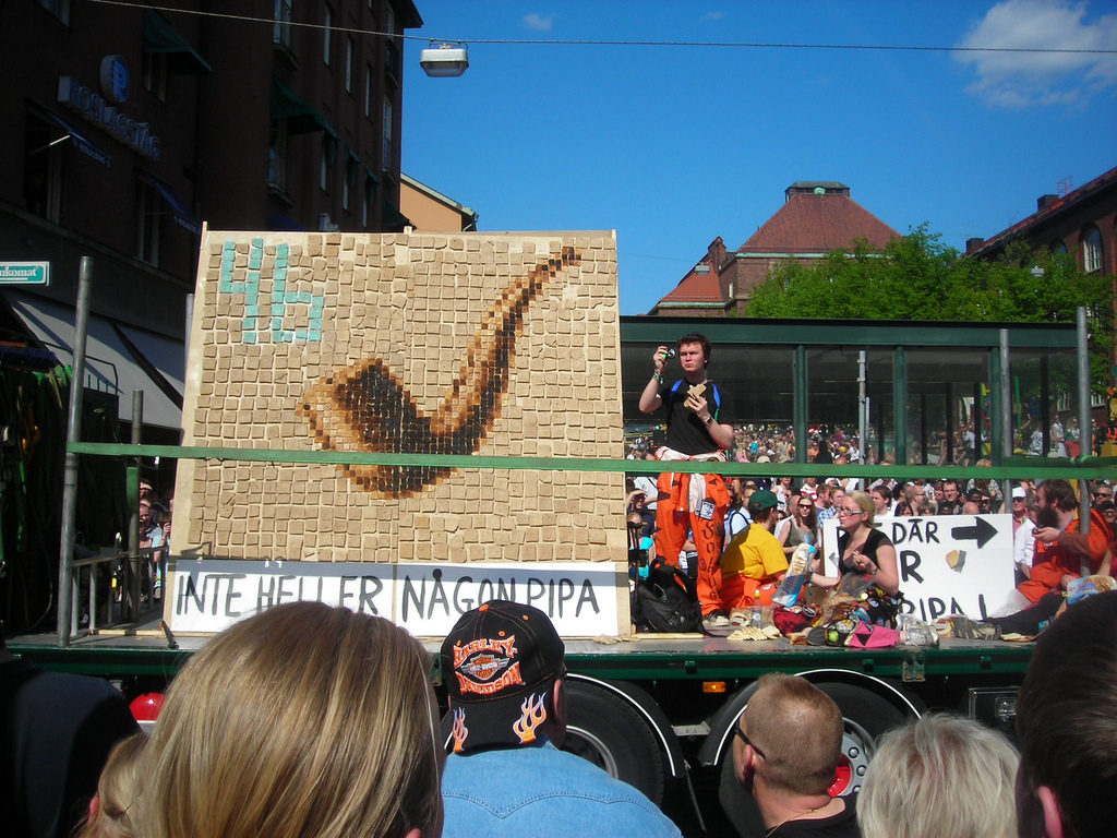 Ceci n'est pas une pipe